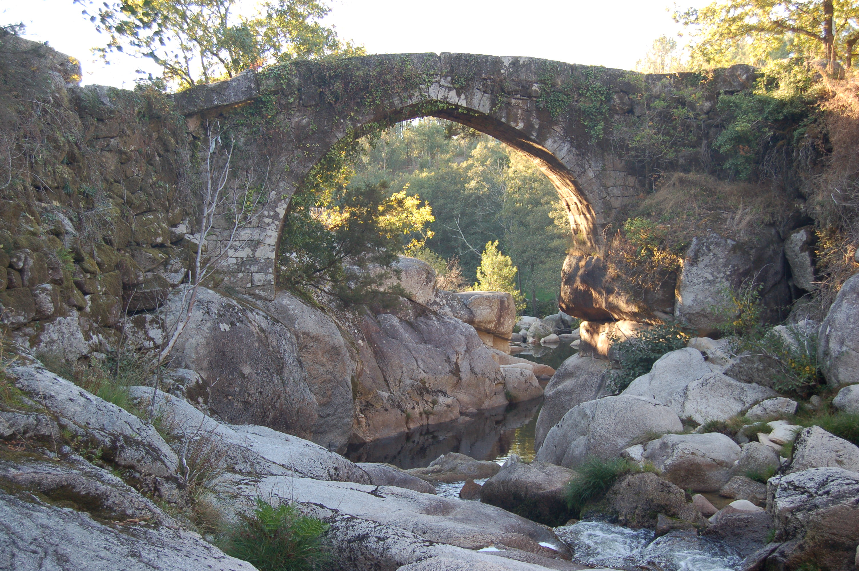 Ponte medieval sobre o río Almofrei (Cotobade)